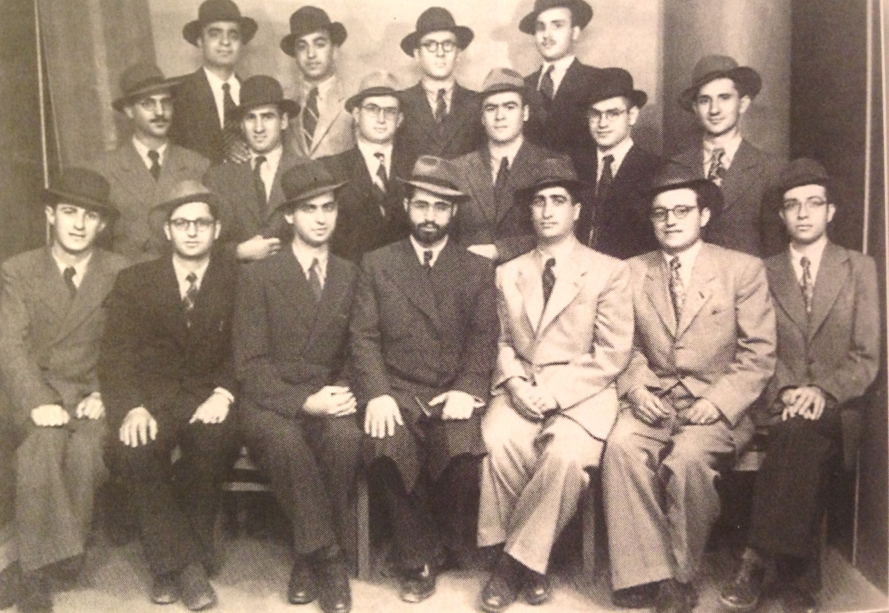 הרב עובדיה יוסף במסיבת פרידה לפני צאתו למצרים